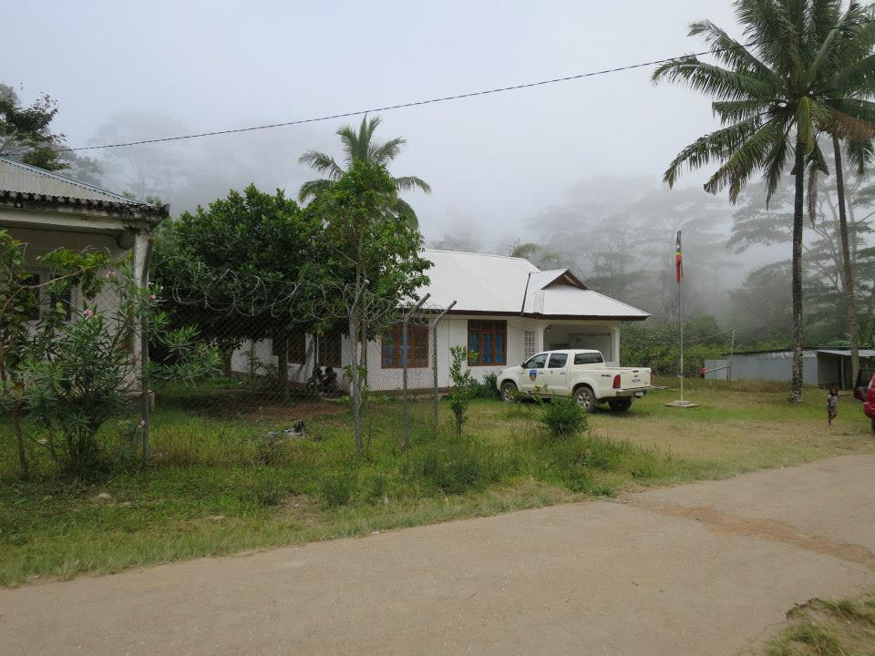 Remexio Vila